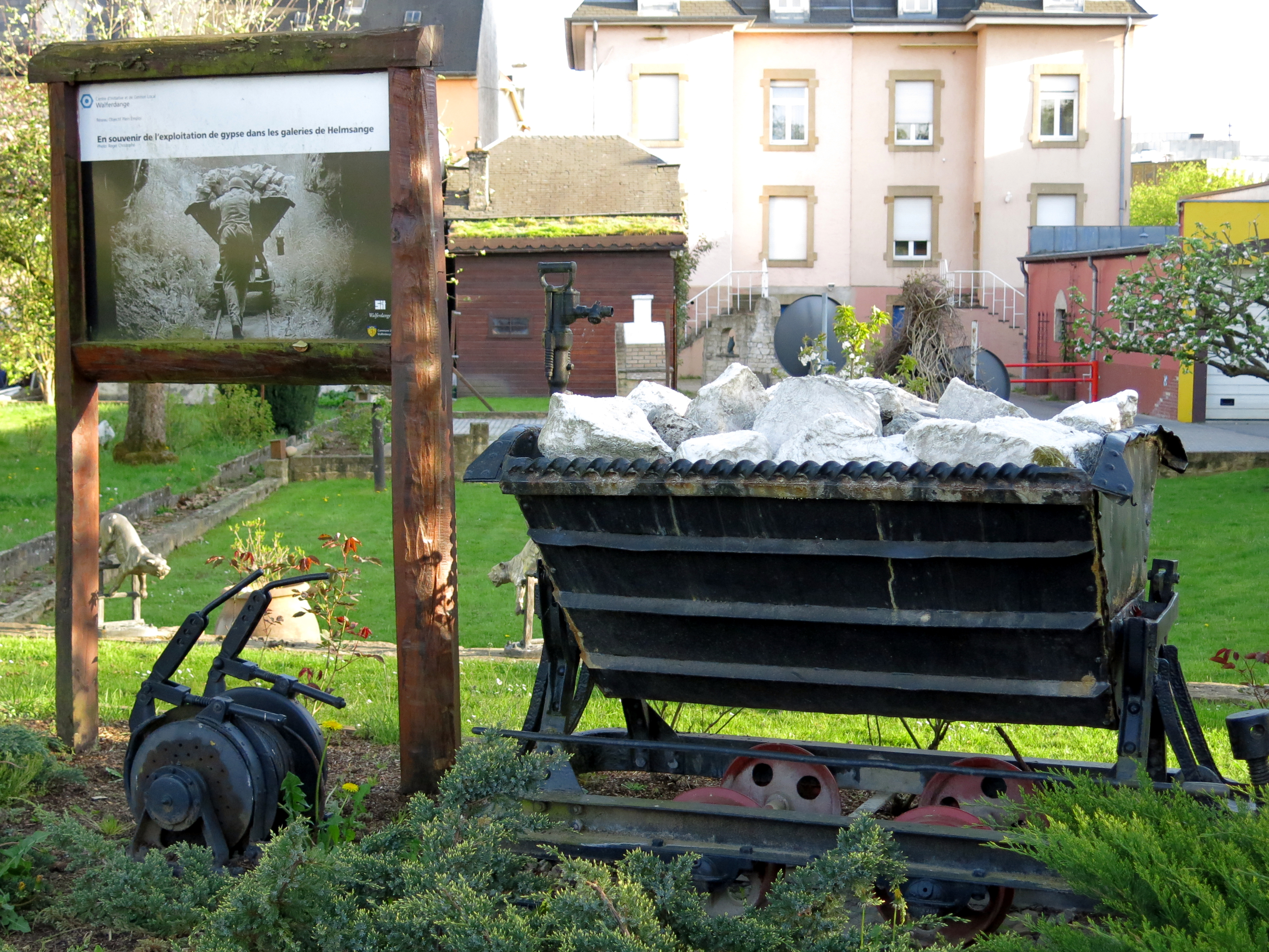 Erënnerung un d'Walfer Gipsgrouwen.